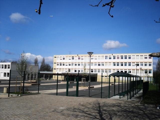 Le collège des Dines-Chiens à Chilly-Mazarin (91)